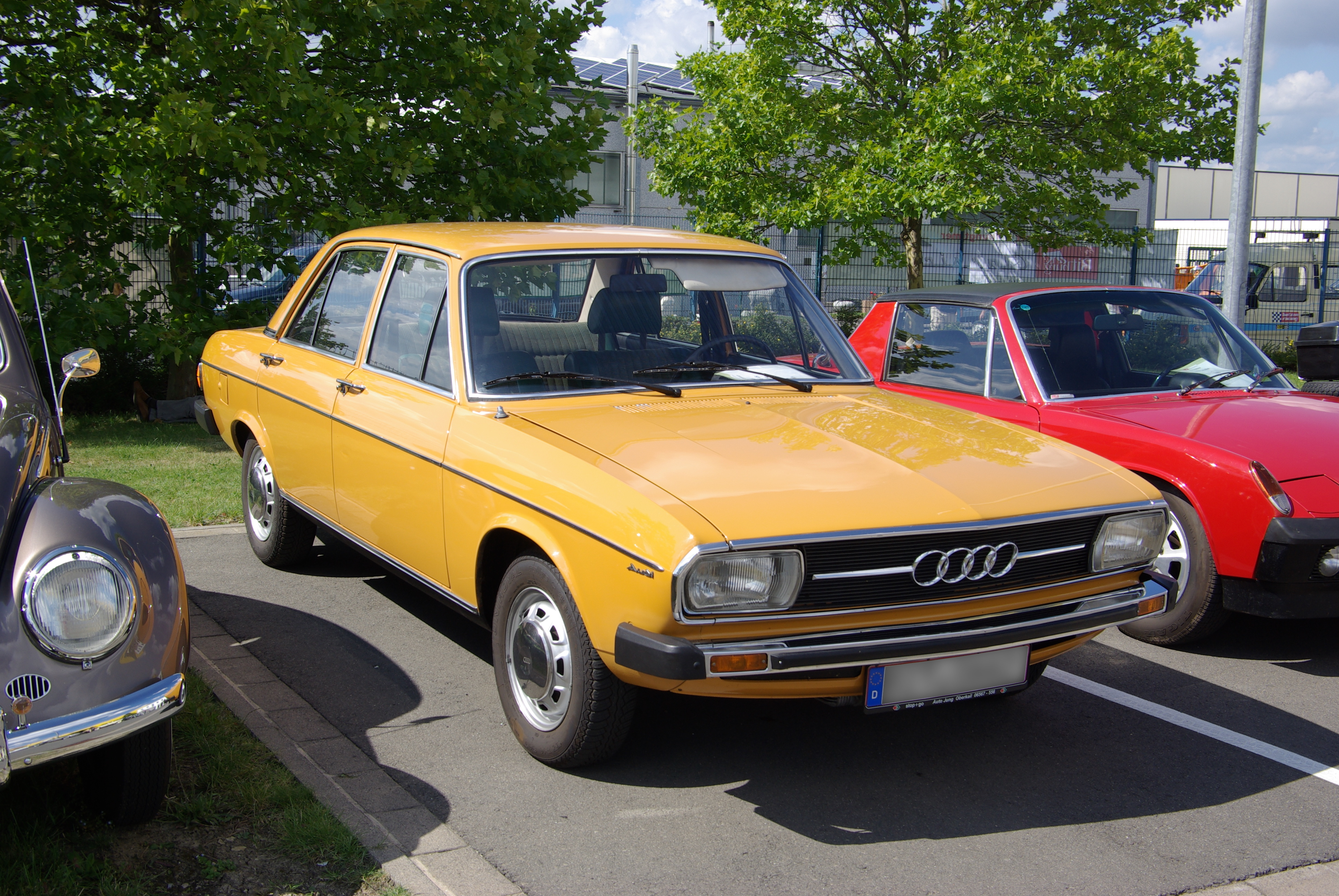 Audi 100 C1, Baujahr 1974, 1600 cm³, 85 PS Bitburg Classics 2011